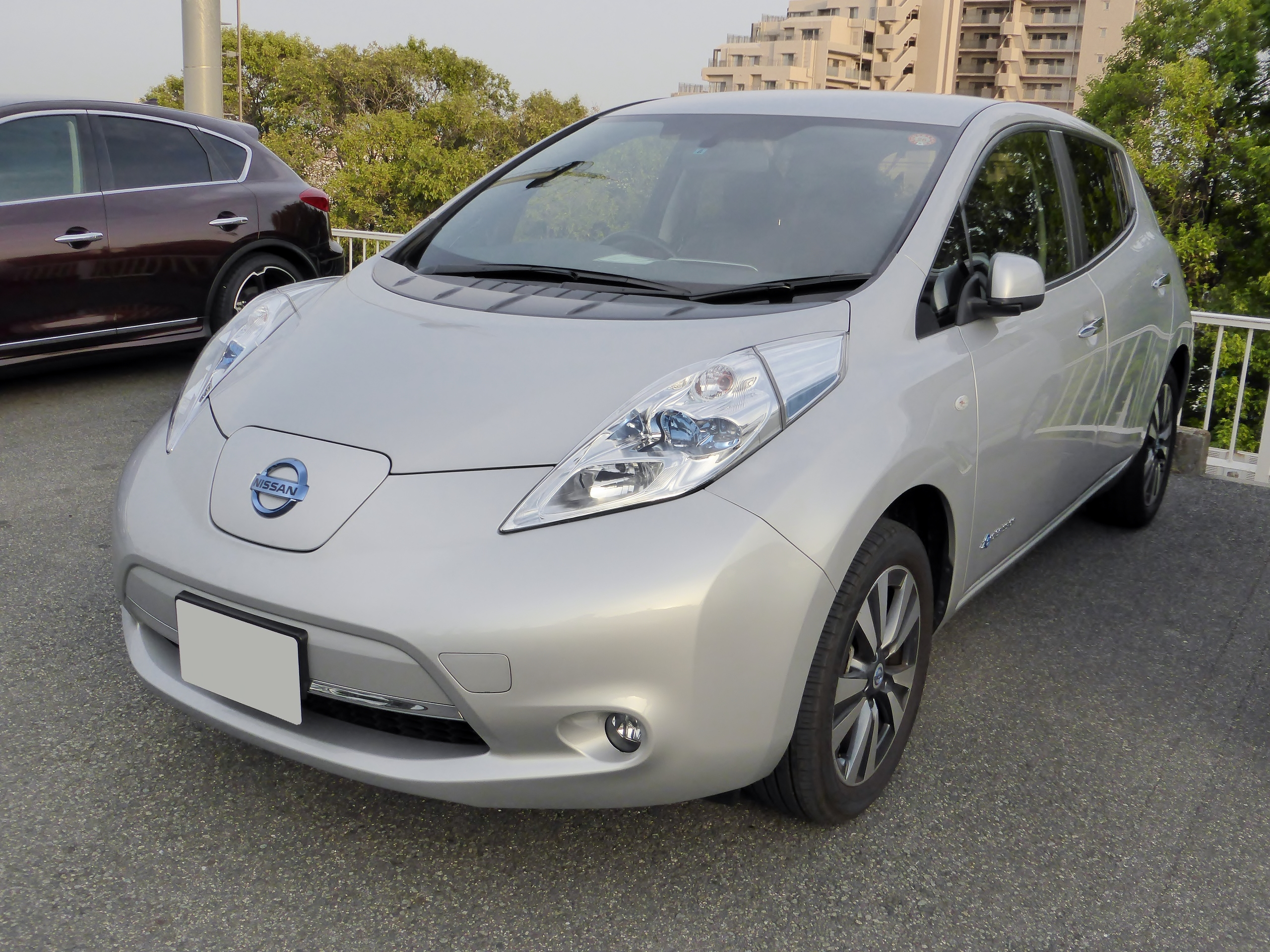 ZE0後期型日産・リーフをフロントから撮影。